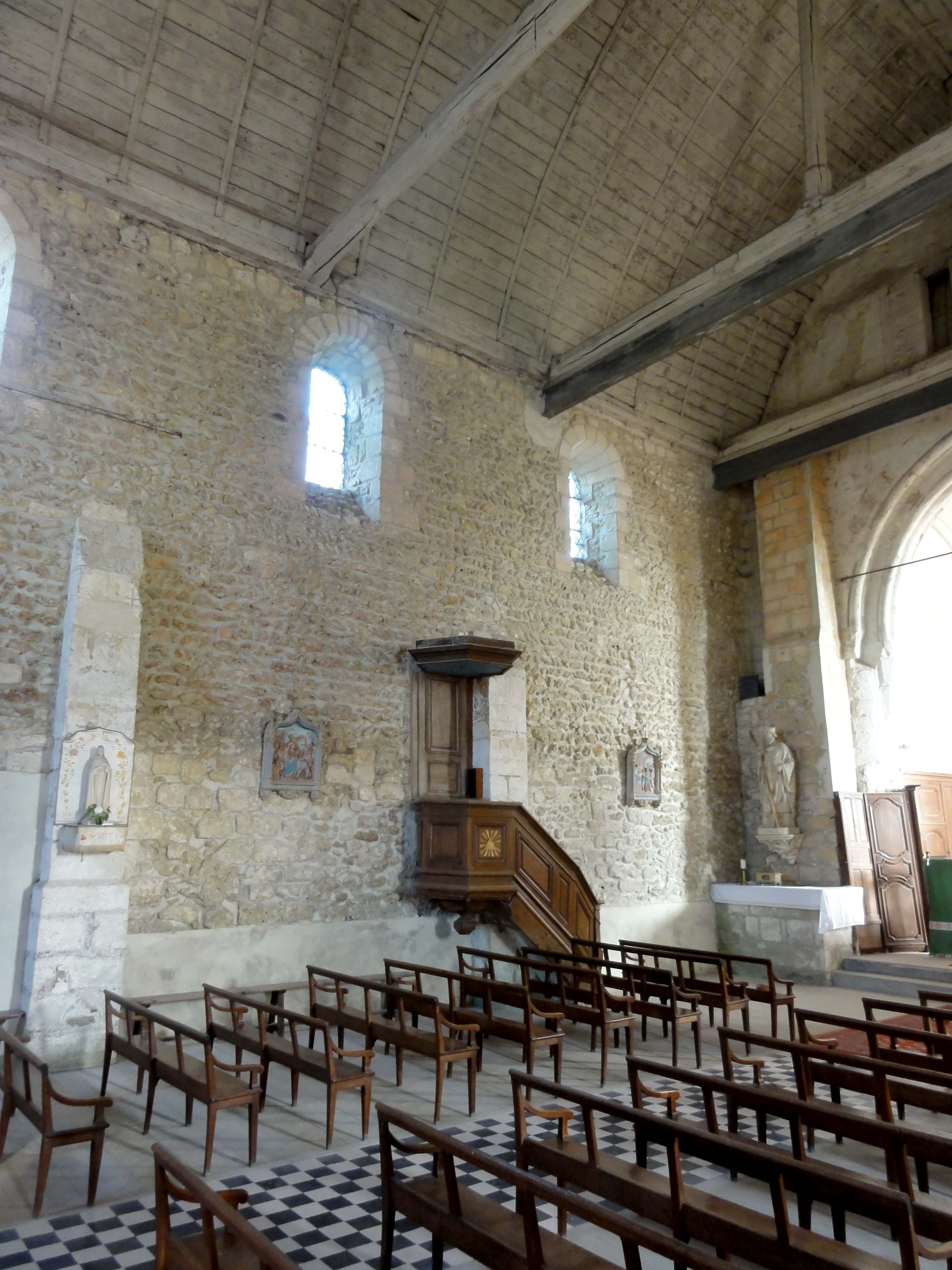 Intérieur de l'église - voir titre.